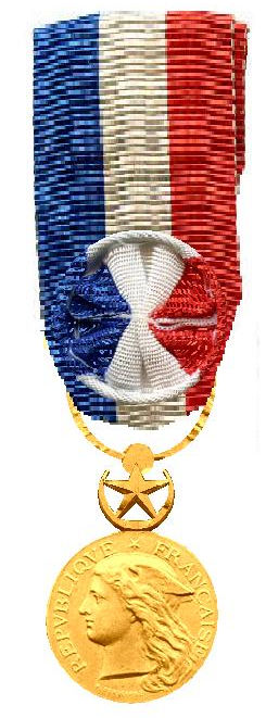 Médaille d'honneur des Épidémies Franse onderscheiding